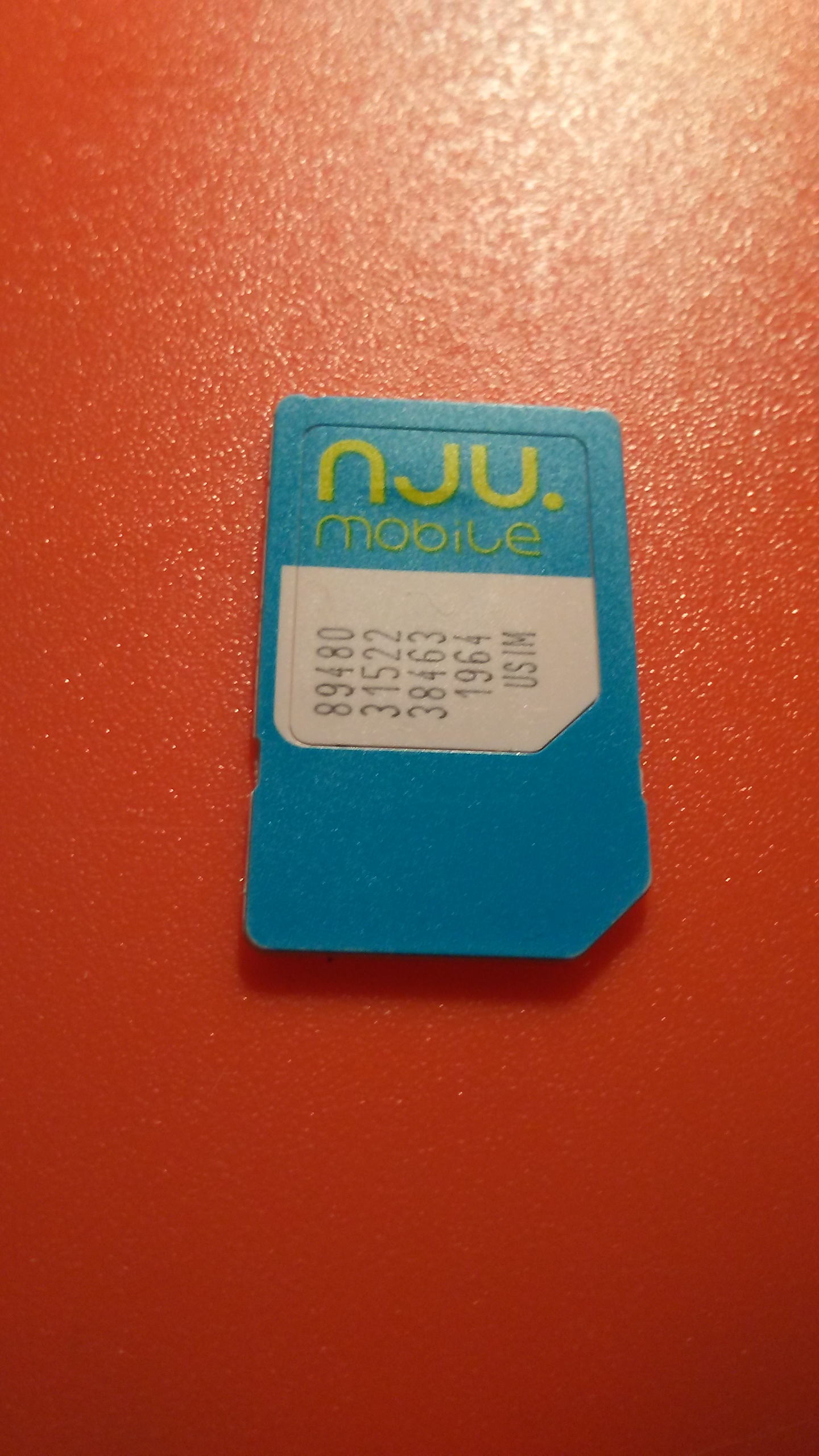 Karta SIM NJU. SIM card of polish network NJU